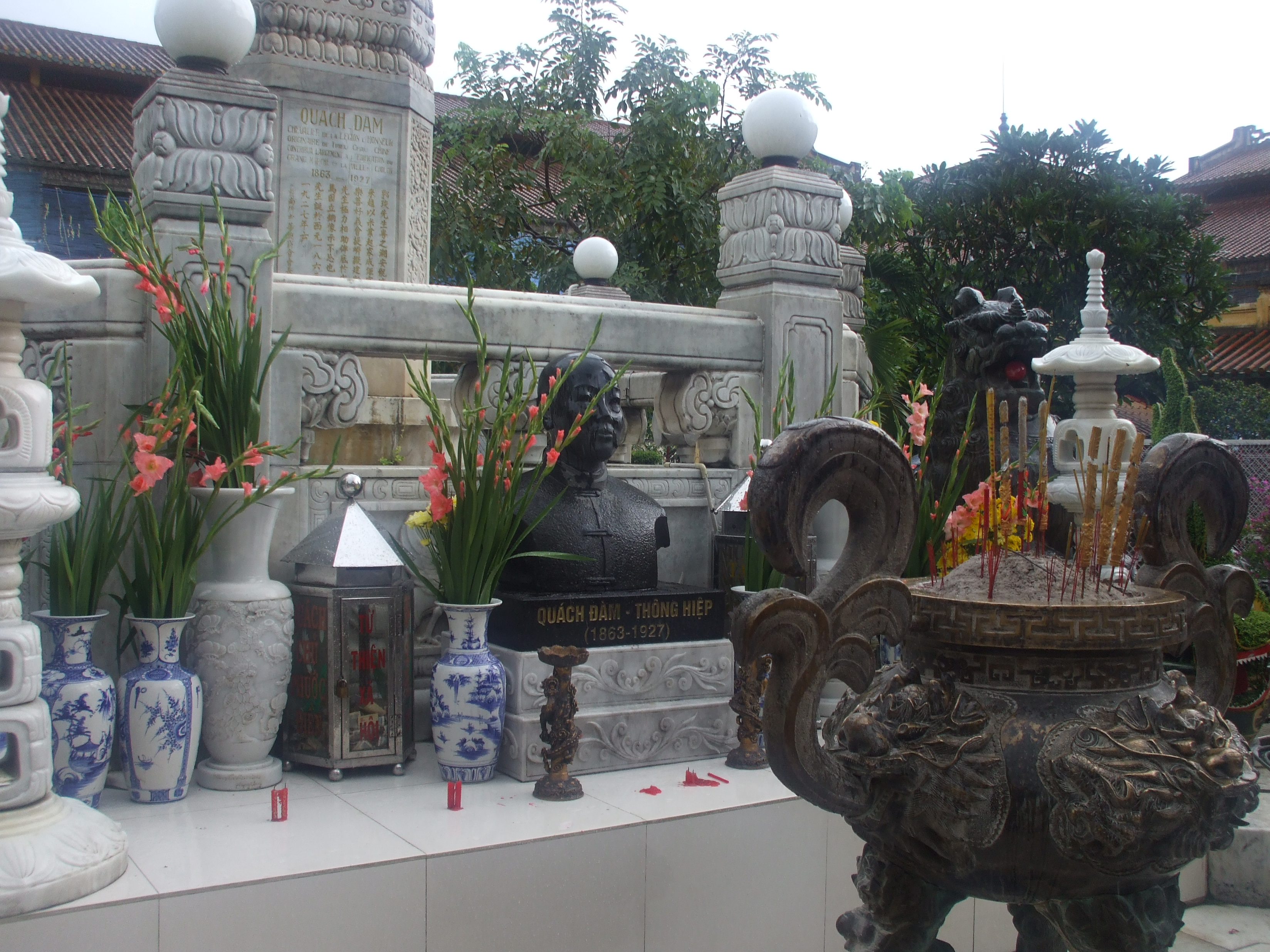 Tượng Quách Đàm ở nơi thờ ông trong chợ Bình Tây (Sài Gòn, Việt Nam)